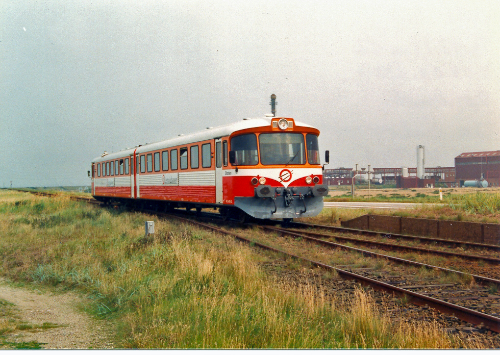 Ys 12/Ym 12 "Storåen" erreicht den Haltepunkt Rønland, wo sich der Anschluß der Chemiefirma Cheminova - im Hintergrund zu sehen - befindet.